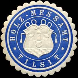 Sealing stamp Title: Holz-Messamt Tilsit Description: blau, weiß, geprägt Place: Tilsit/Ostpreussen size: 4 cm